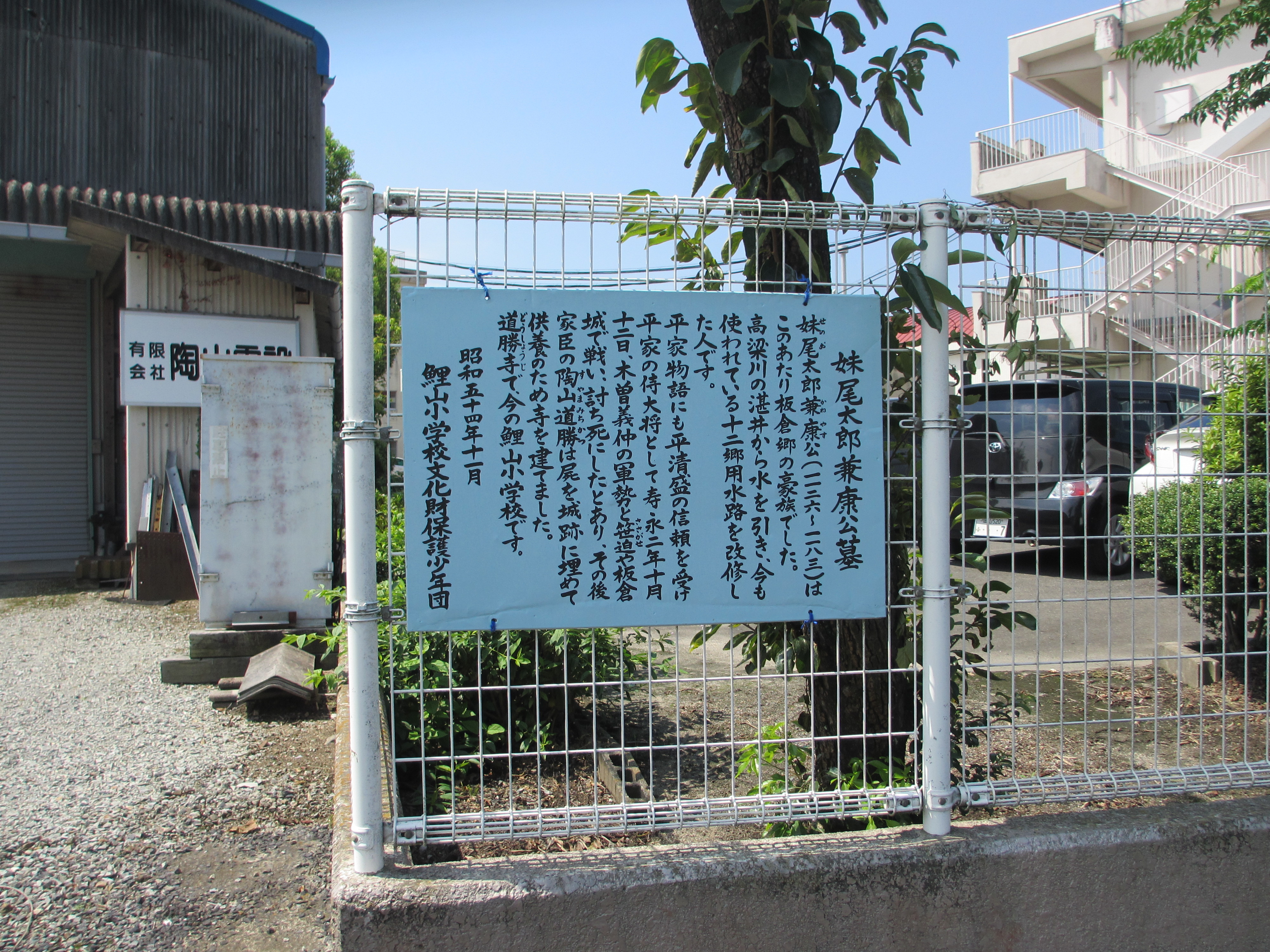 墓所手前柵、看板の会社は陶山氏の子孫のの方